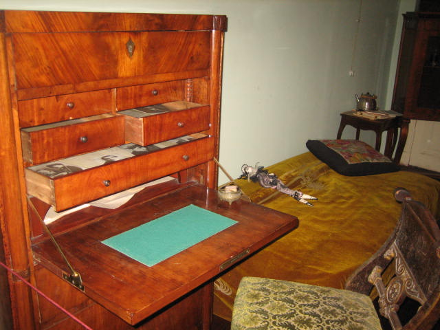 Письменный стол Анны Ахматовой. Лежат подлинные письма поэтессы в защиту репрессированного сына Л. Гумилёва. Экспонат из Музея Анны Ахматовой в Фонтанном Доме.